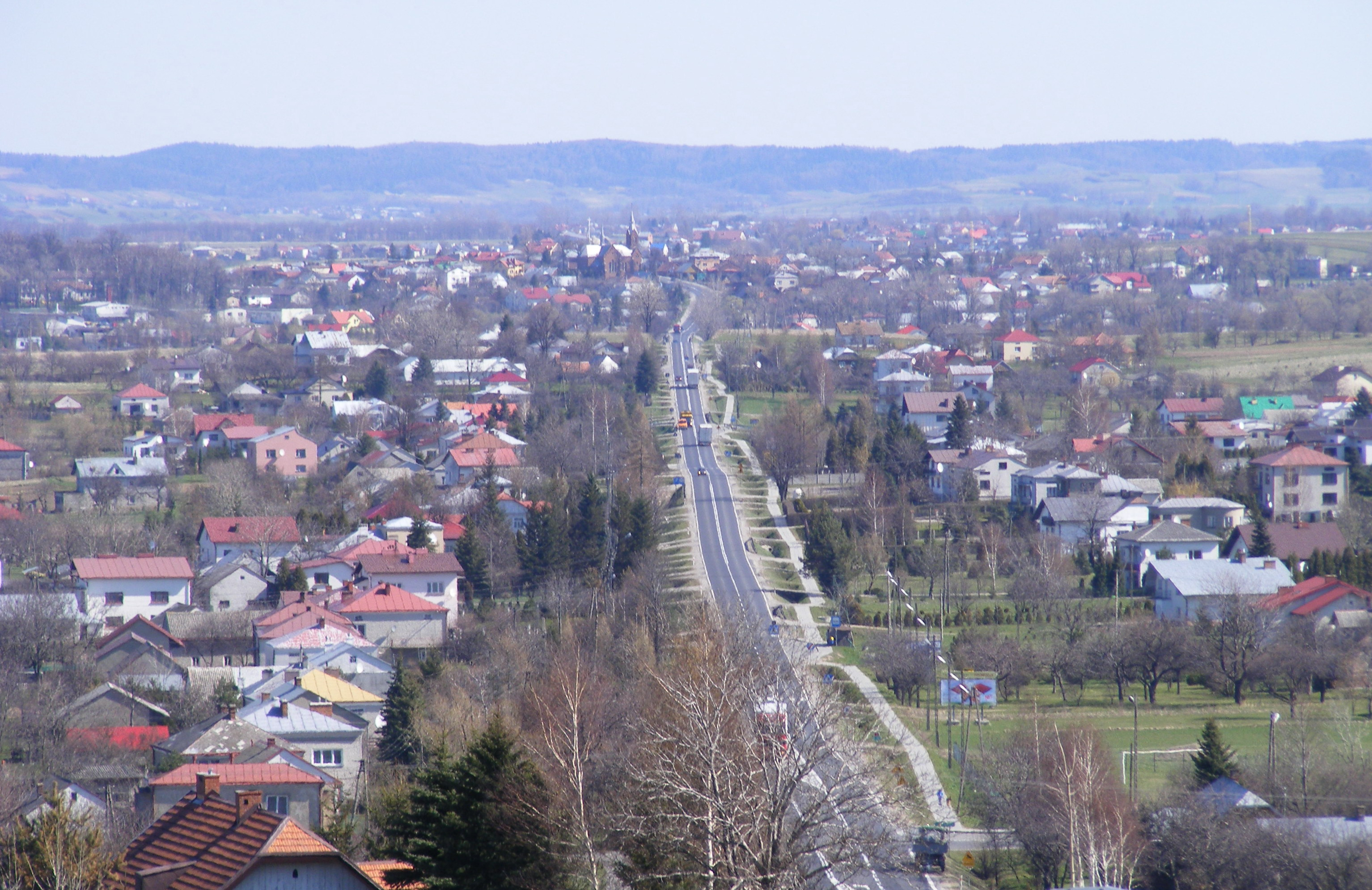 Rogi, widok z góry. Przez wieś przebiega droga krajowa nr 9.